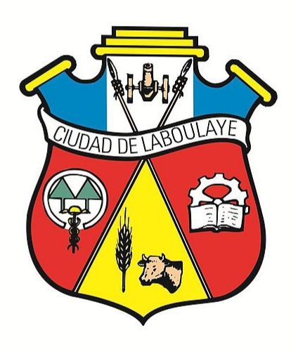 Escudo de Laboulaye